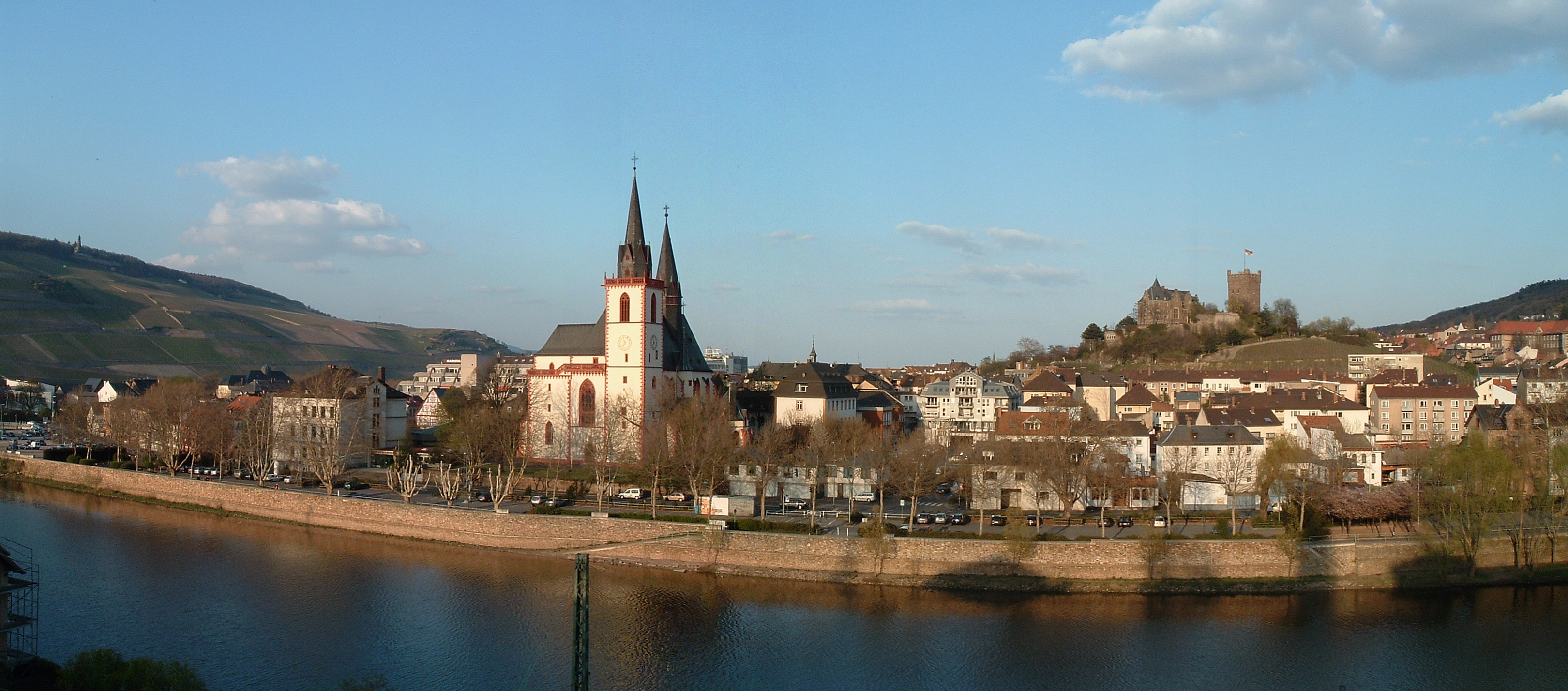 Panorama de Bingen